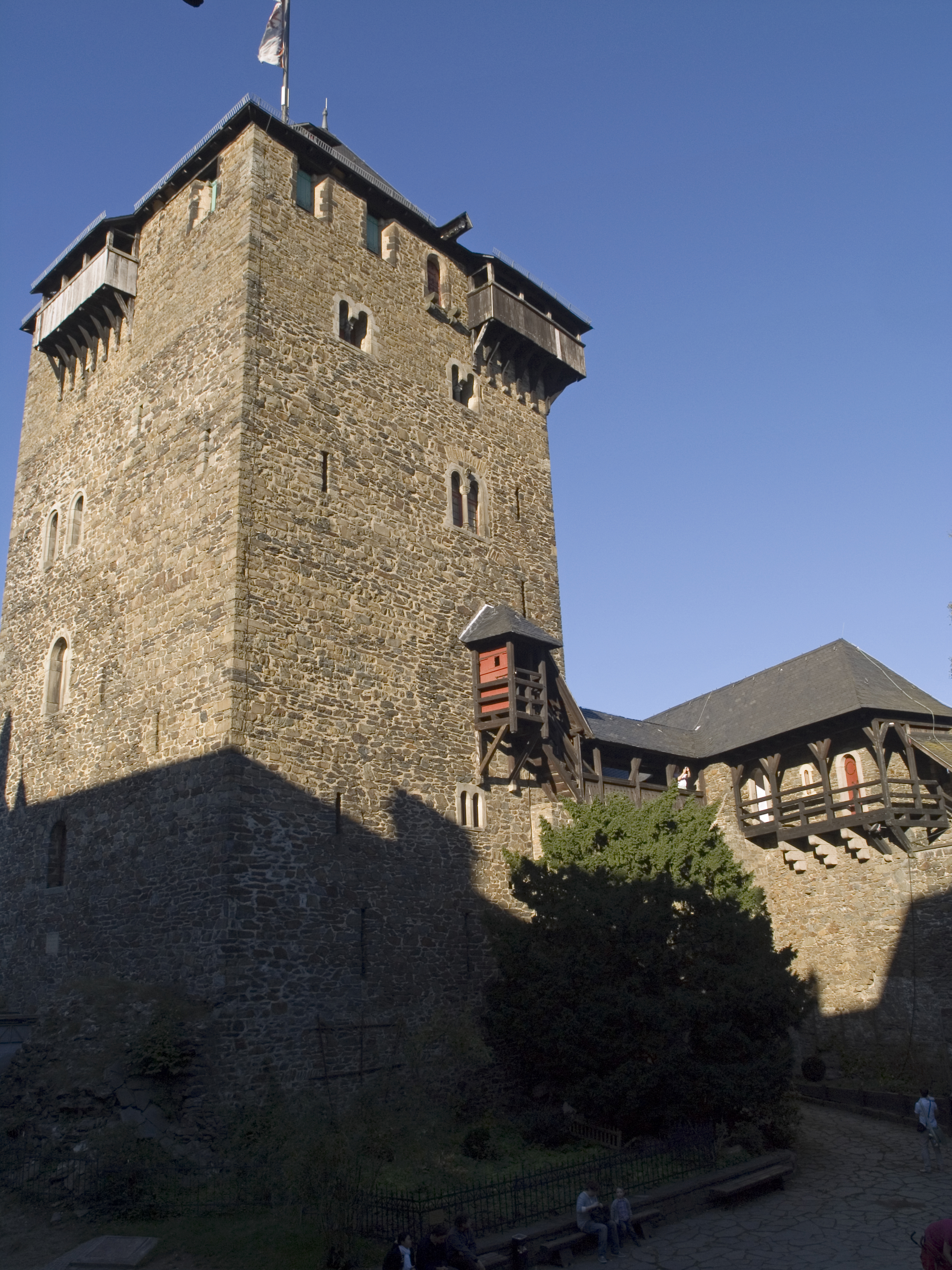 Bergfried des Schlosses Burg